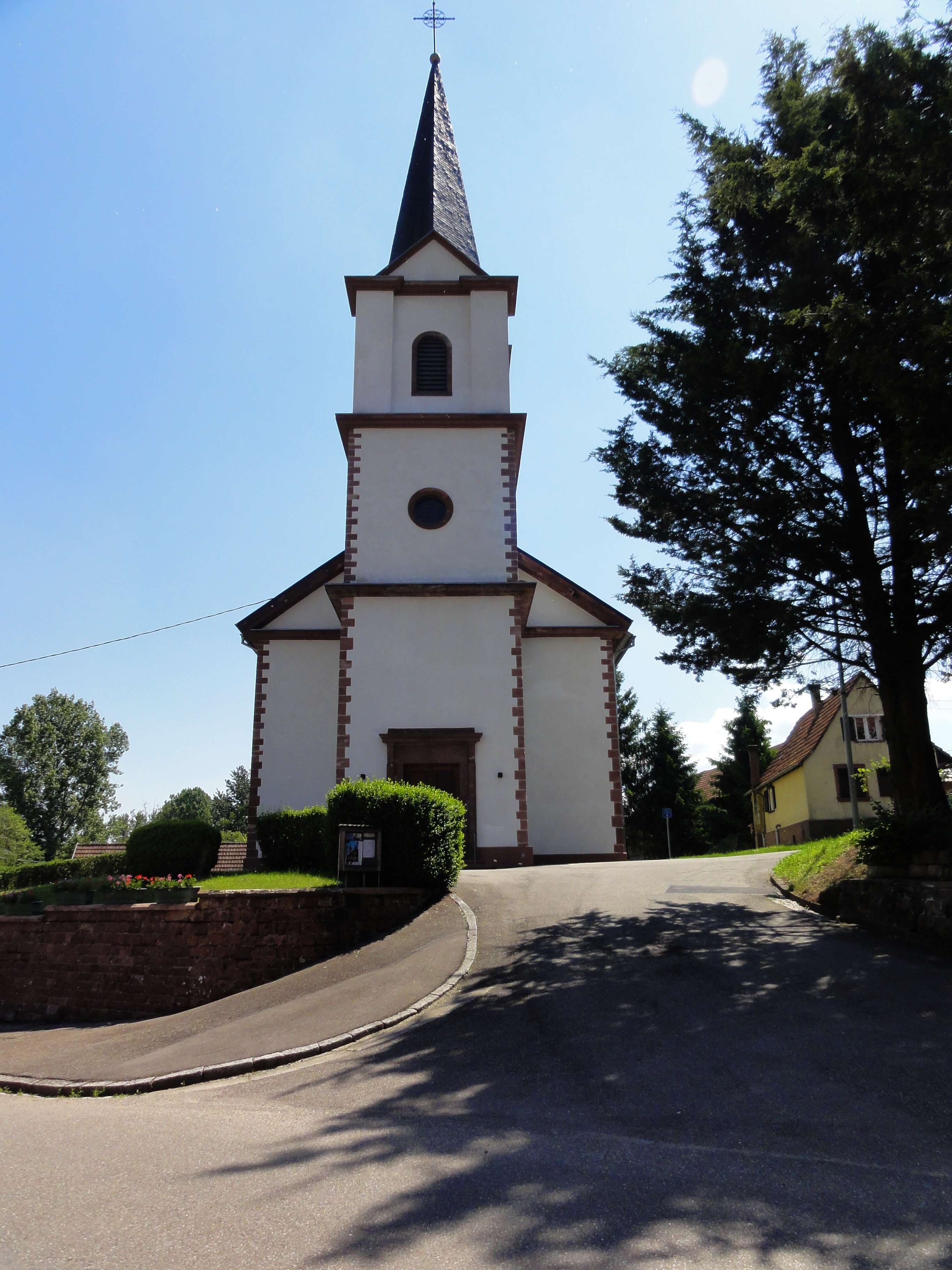 Alsace, Bas-Rhin, Gumbrechtshoffen, Église protestante (1834), 1 rue de l'Eglise.